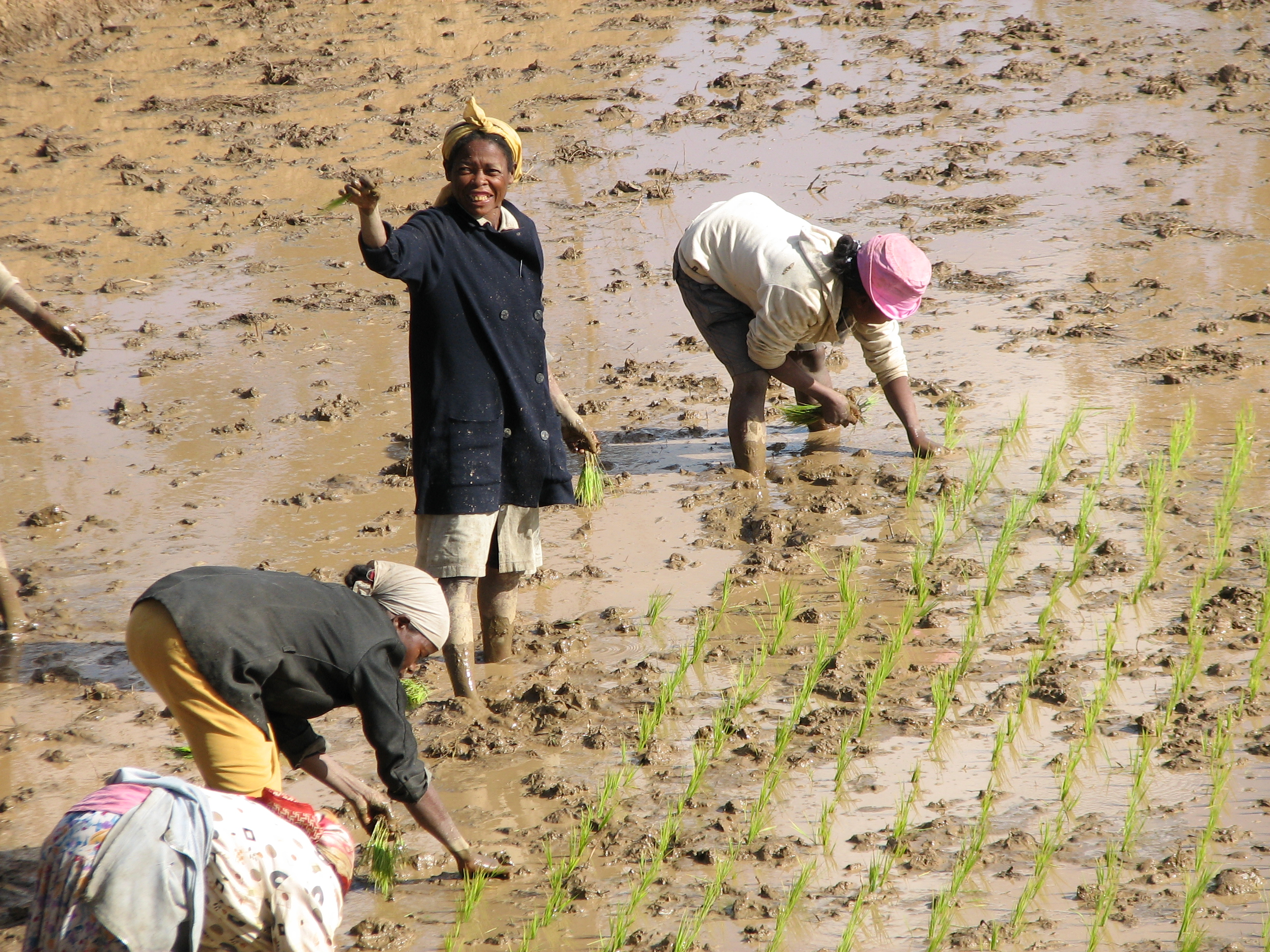 Women planting rice نساء يزرعن الأرز في مدغشقر